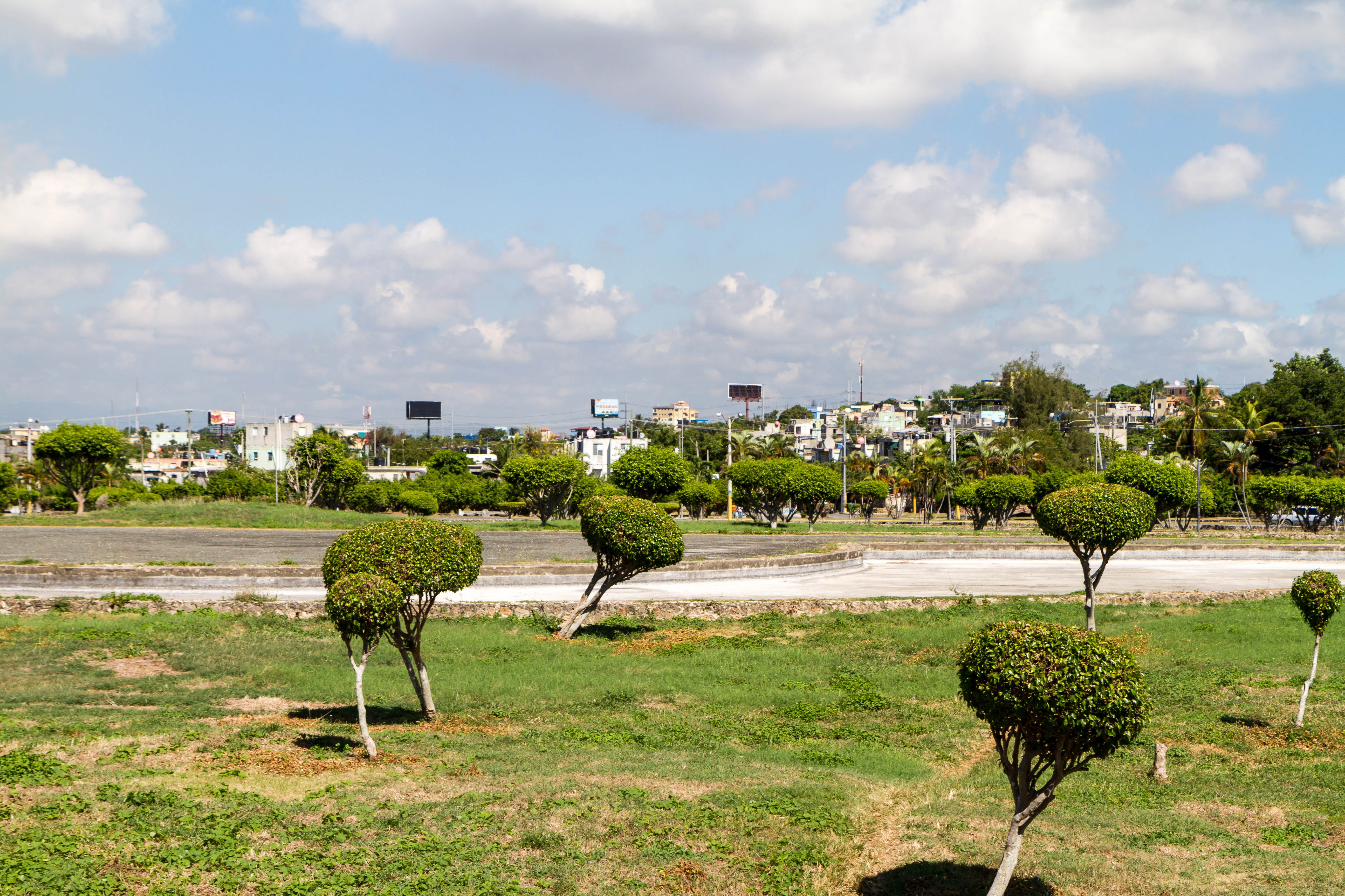 Santo Domingo Este, Dominican Republic